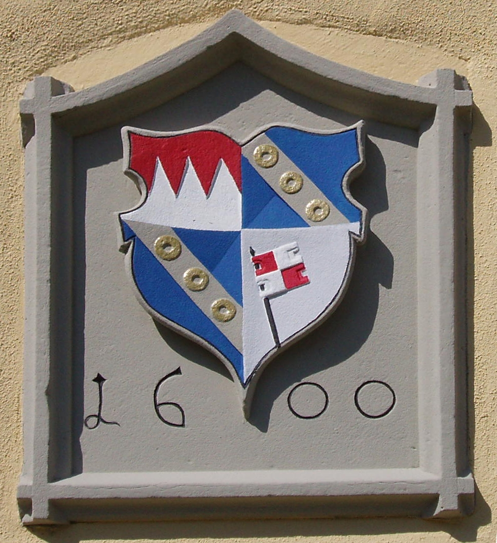 Wappen an der Wallfahrtskirche Maria von der Tann in Rütschenhausen